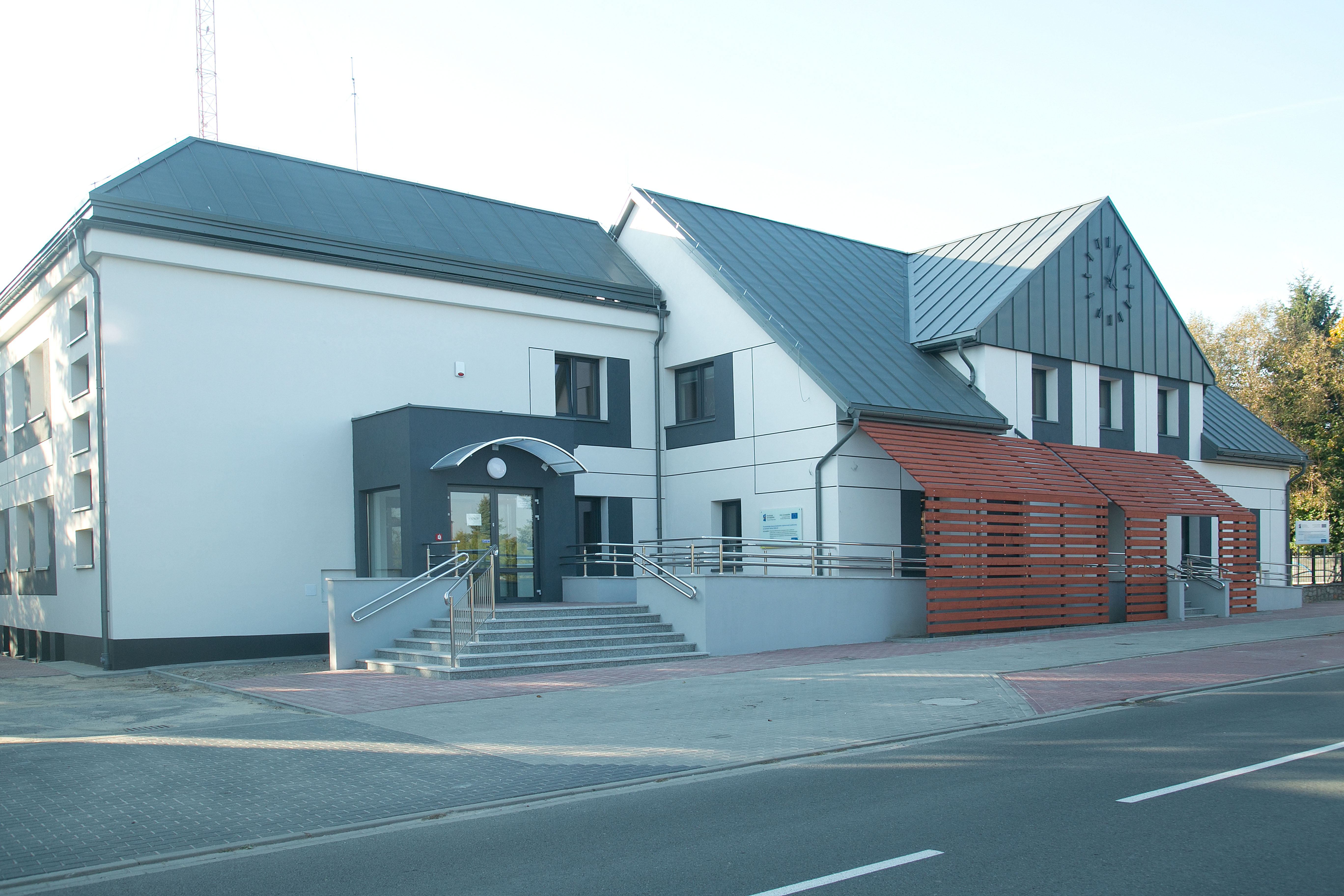 Budynek Urzędu Gminy w Dobroniu